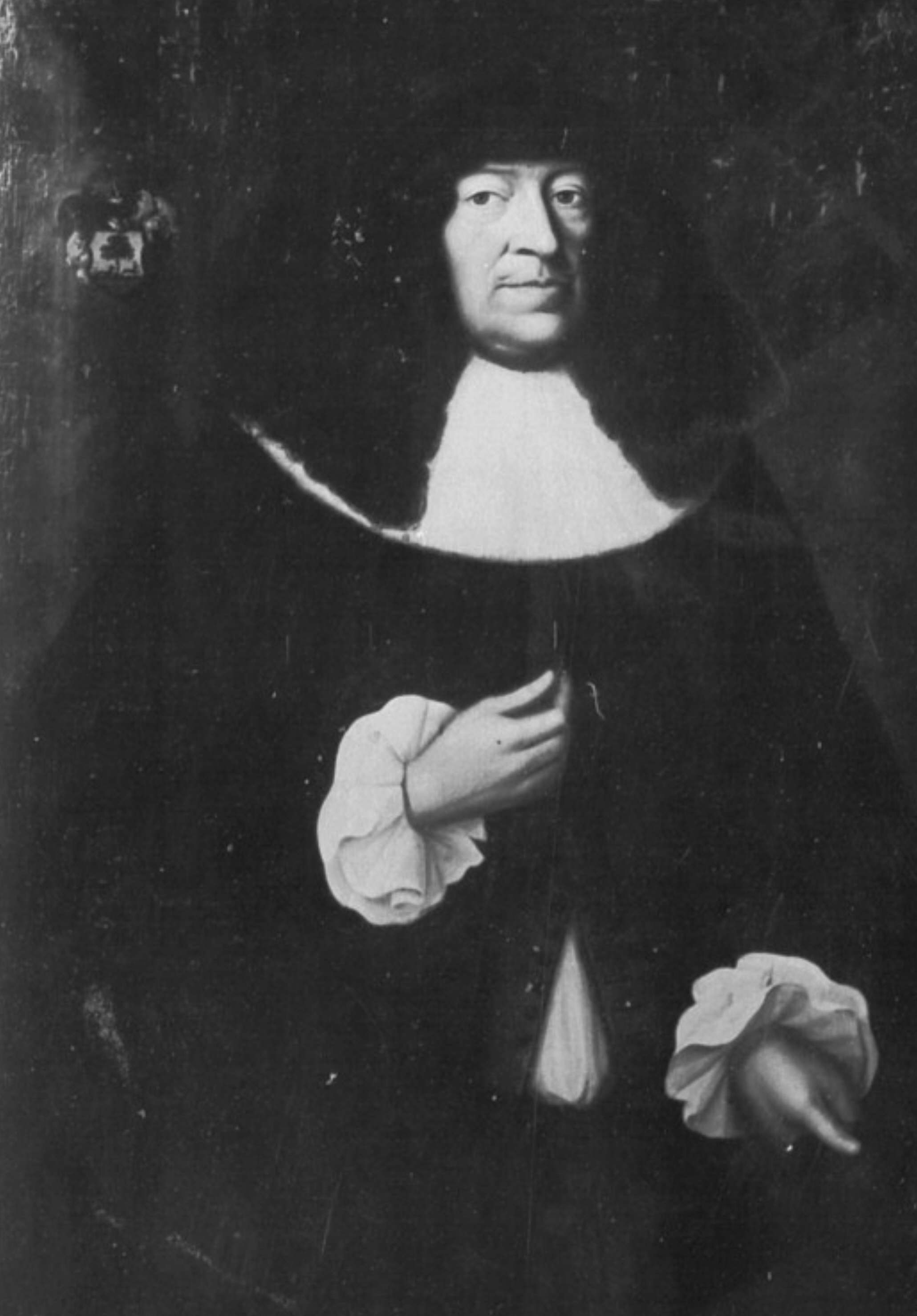 Konrad Schinkel († 27. Dezember 1682), Lübecker Ratsherr